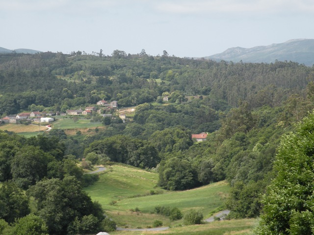 trabadela desde rivela